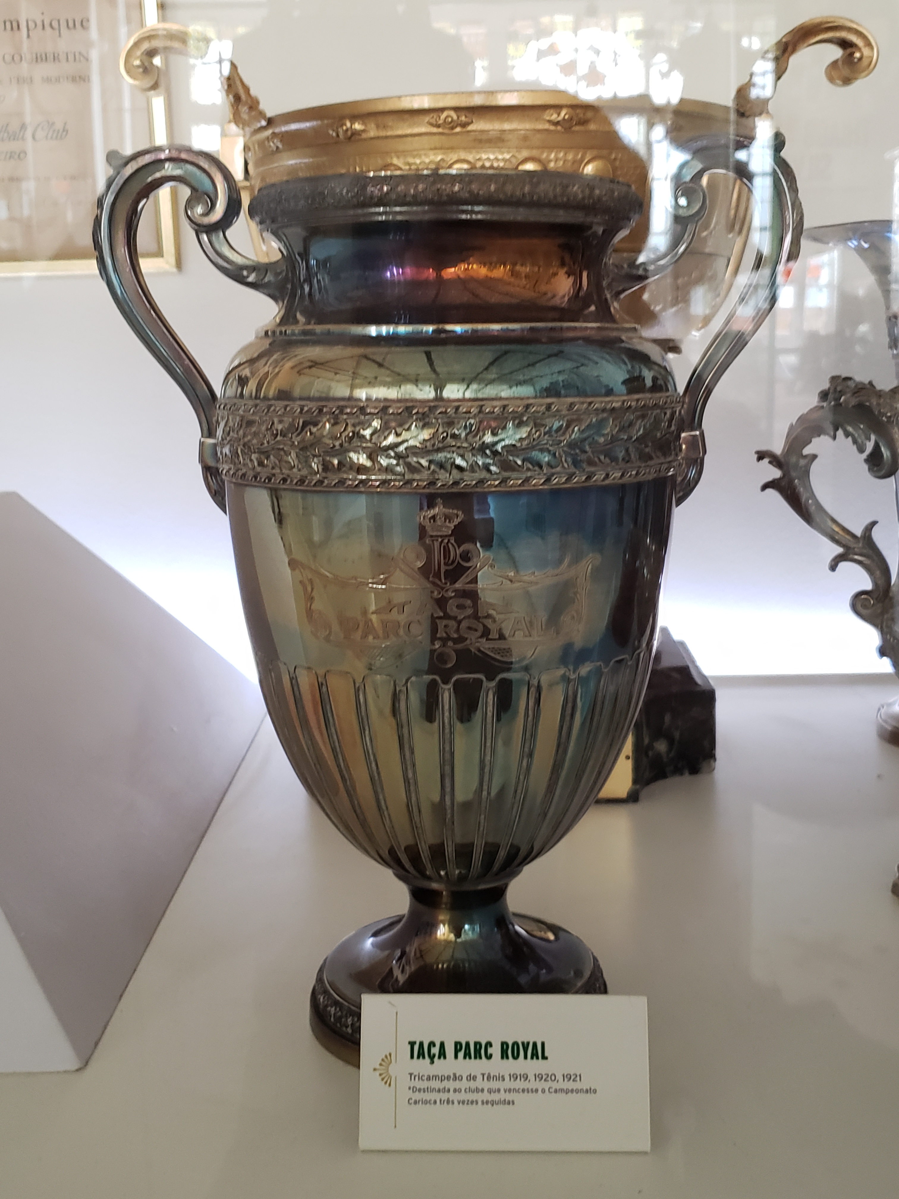 Taça Park Royal, destinada ao clube campeão carioca de tênis que vencesse por três anos consecutivos (1919-20-21), conquistada pelo Fluminense Football Club.